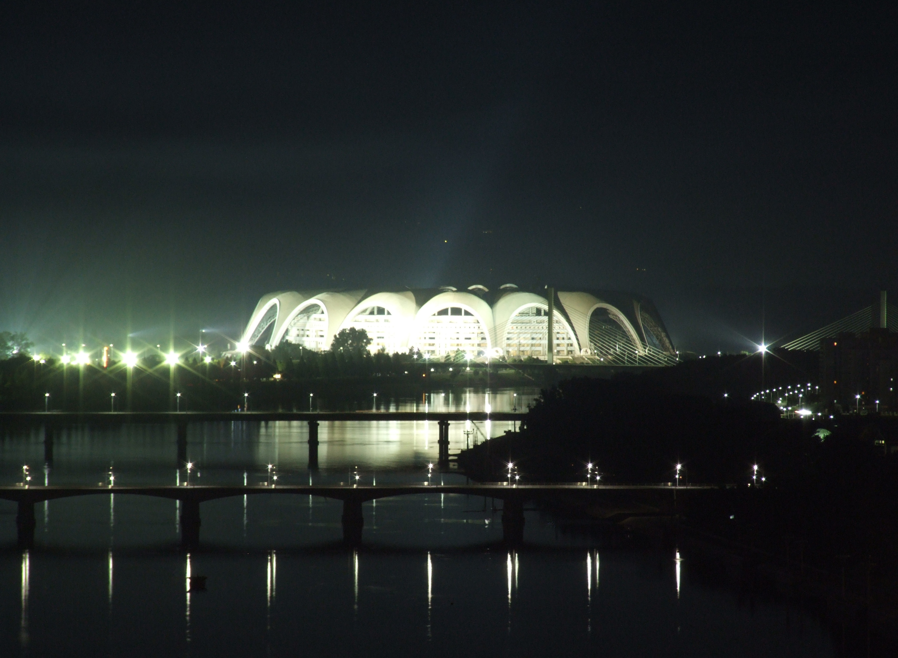 Pjöngjang bei Nacht, Rŭngrado May First Stadium